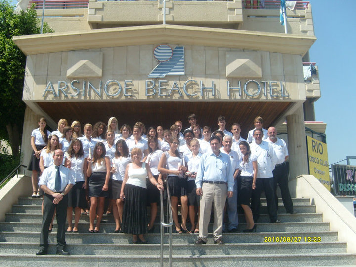 Arsinoe Beach Hotel, Ciprus, Limassol